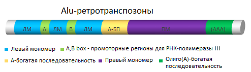 Alu-ретротранспозоны